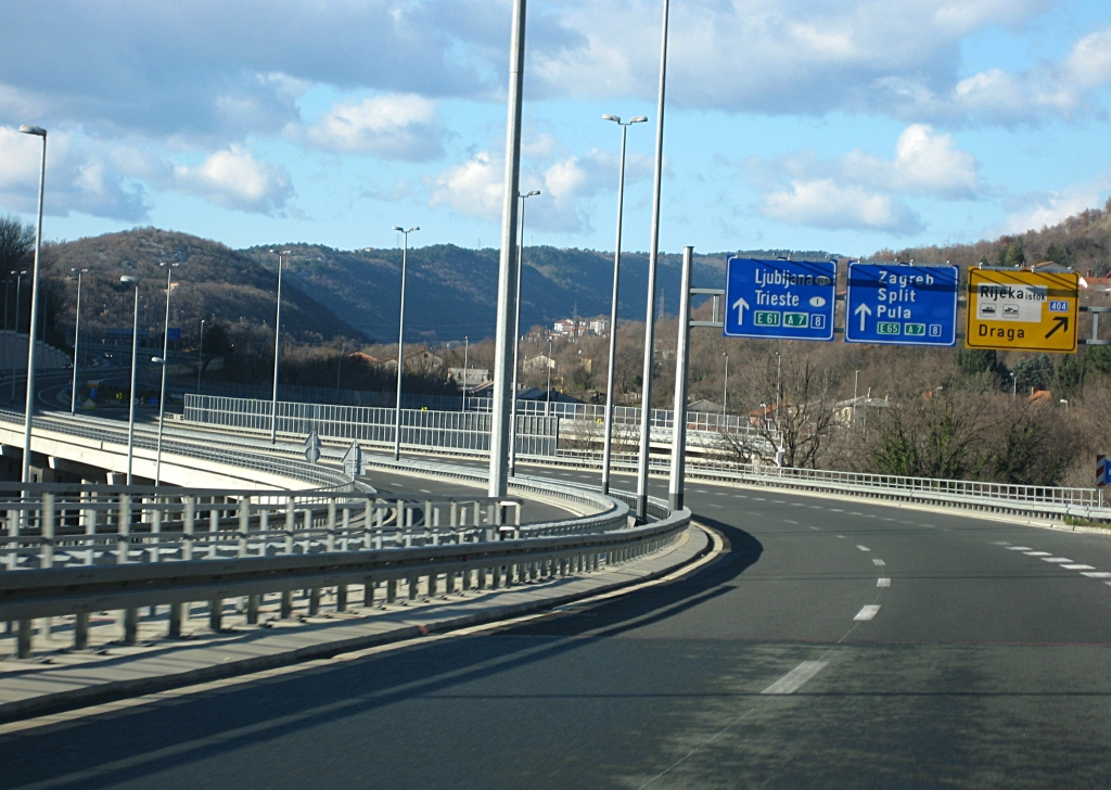 Izlaz Draga na državnoj cesti D8 kod Rijeke